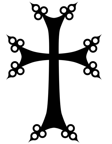 Cruz floreada armenia (Jachkar")